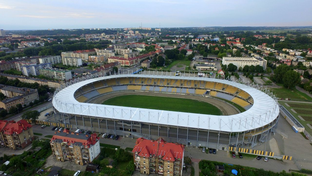 Stadion Żużlowy im. Edwarda Jancarza w Gorzowie Wielkopolskim, widok na śródmieście.